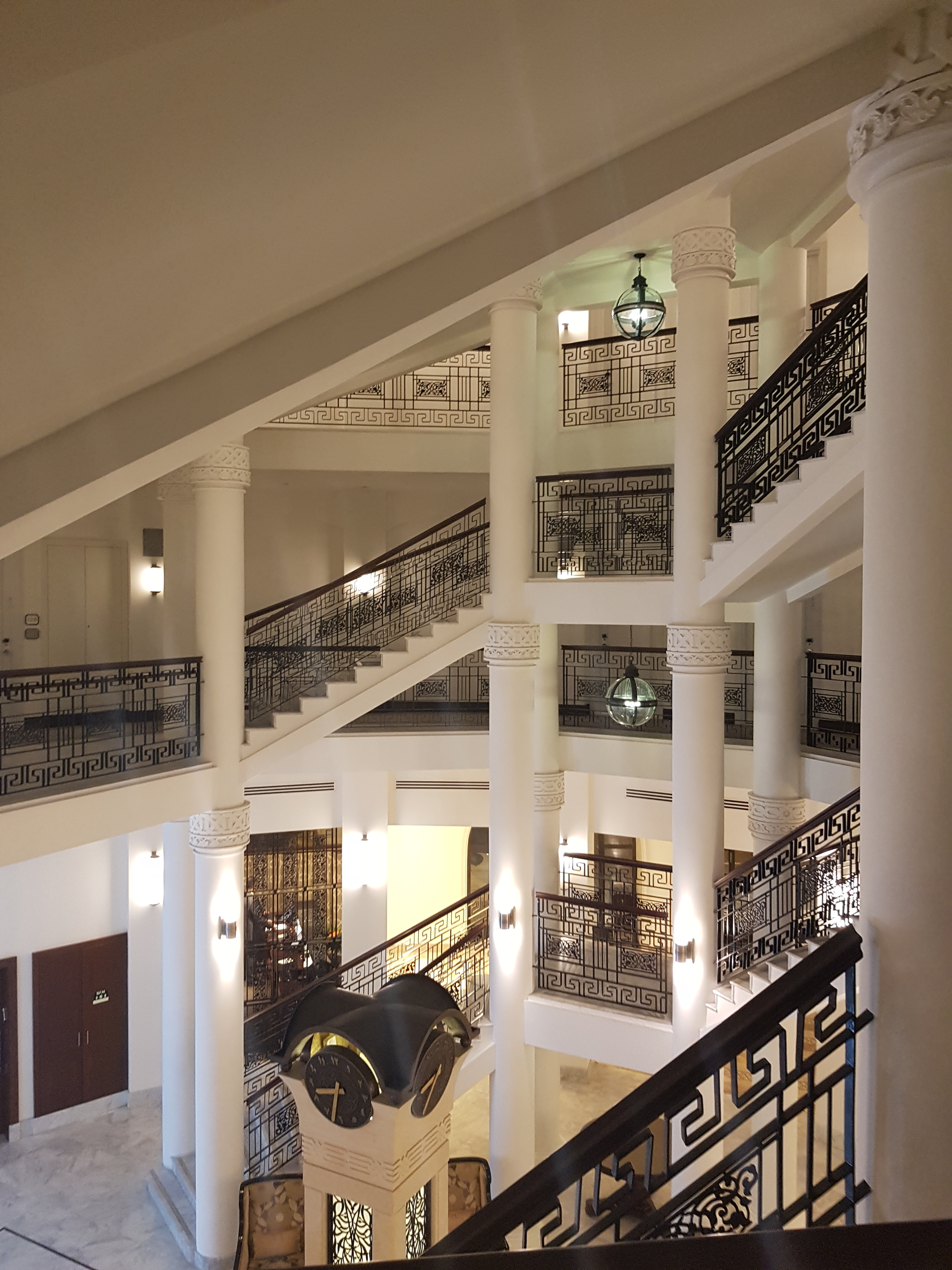 פנים המלון